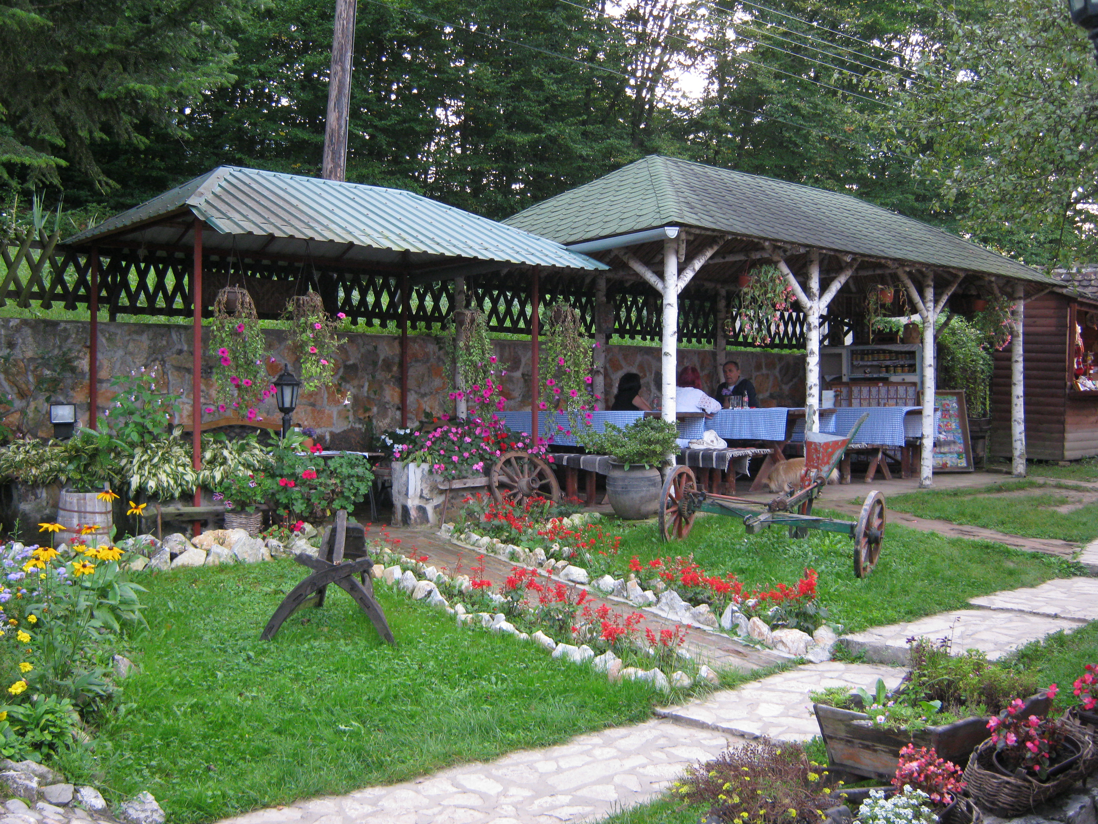 Етно парк Терзића авлија, као сеоско туристичко домаћинство, из околине Ужица, у селу Злакуса (185 km од Београда) представља једну врсту музеја на отвореном и затвореном. У близини се налази Потпећка пећина тако да је савршено место за излет и увид у прелепу историју села, културе и природних лепота Србије.